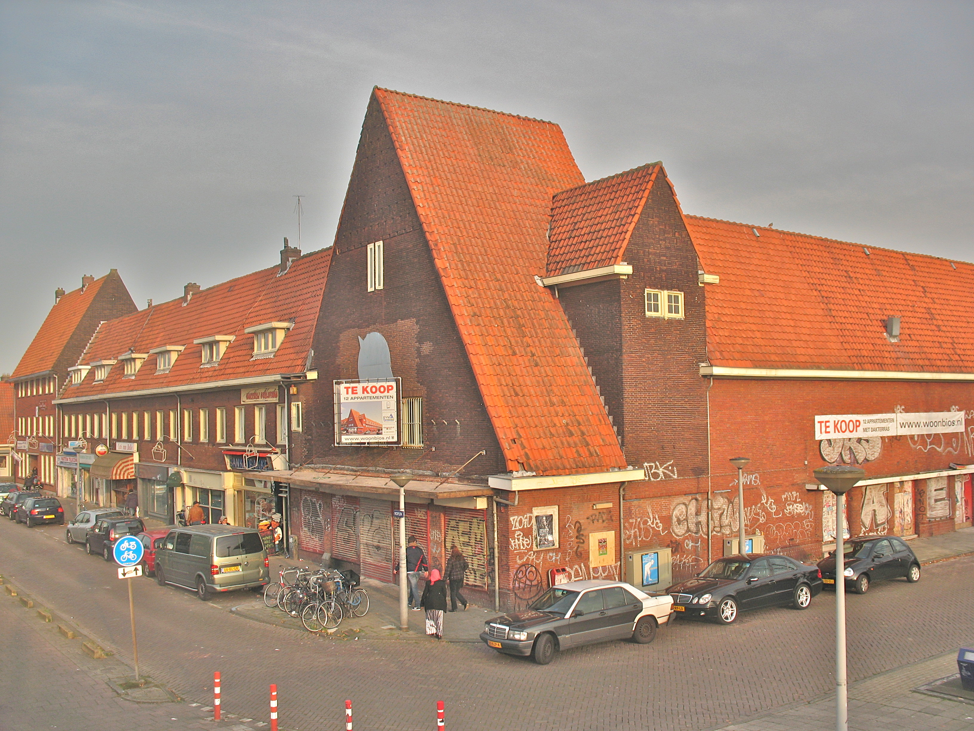 Woningen in de polder Buiksloterham, Amsterdam-Noord. Amsterdam, hoek Mosveld-Mosplein. Bioscooptheater Astoria.